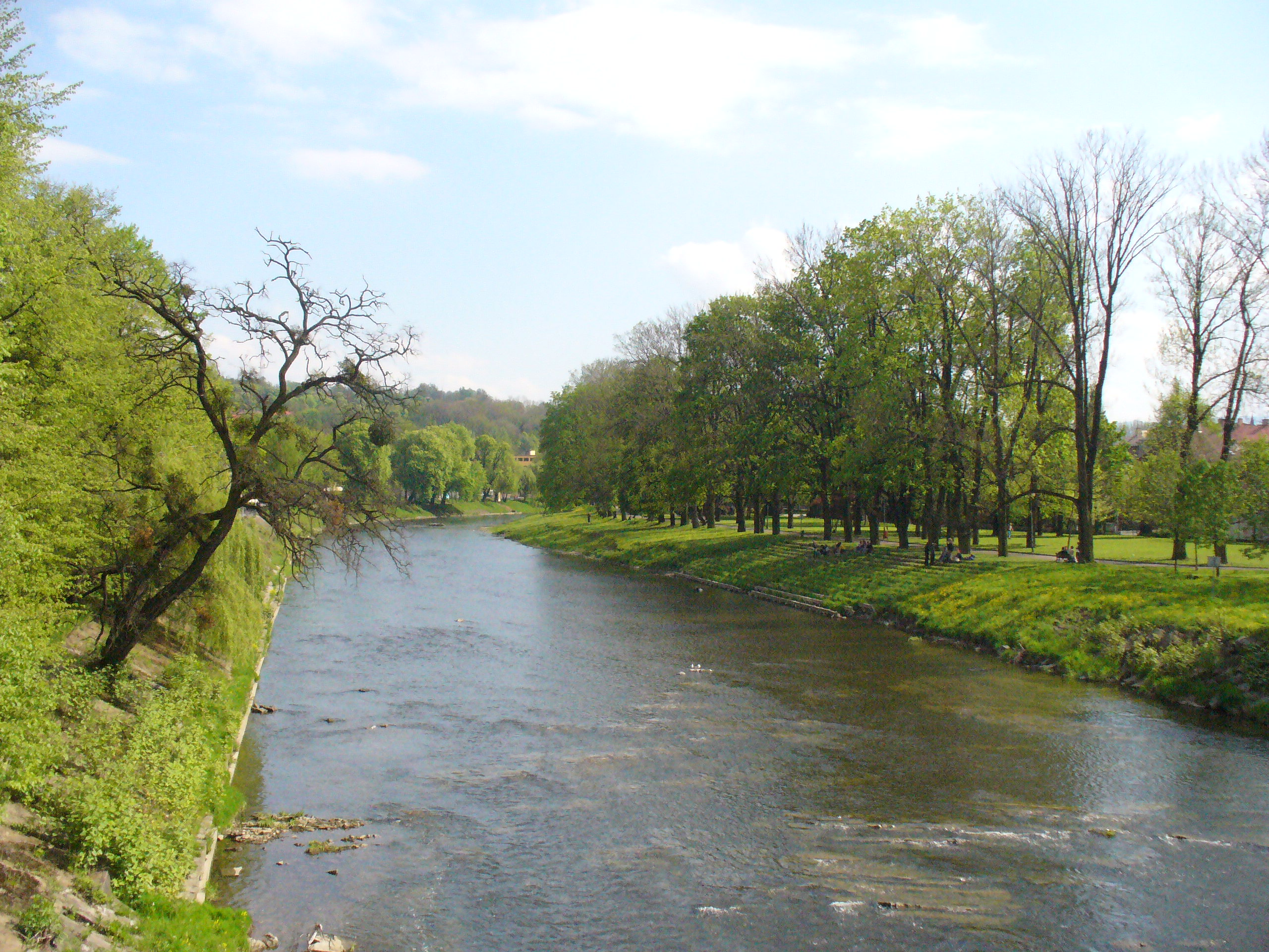 Rzeka Olza w Cieszynie.